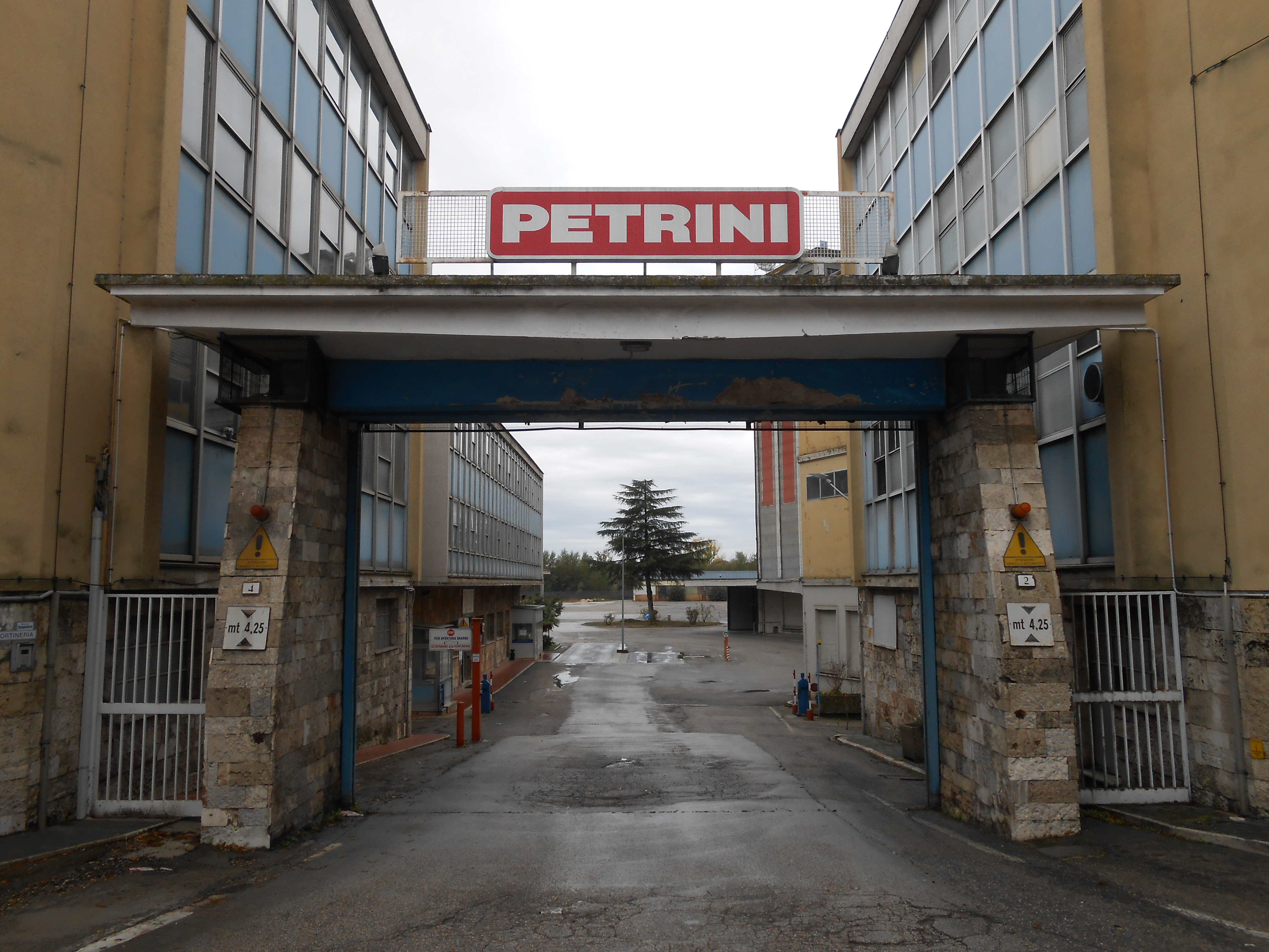 Ingresso Petrini-Spigadoro a Bastia Umbra, Italia.